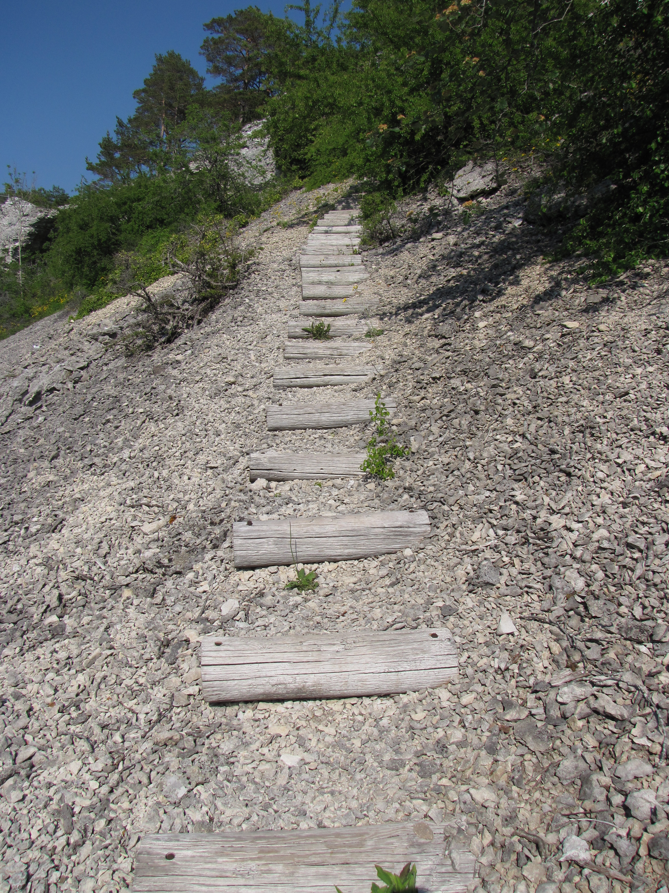 Trappa i Bergbetningens naturreservat strax söder om Visby.